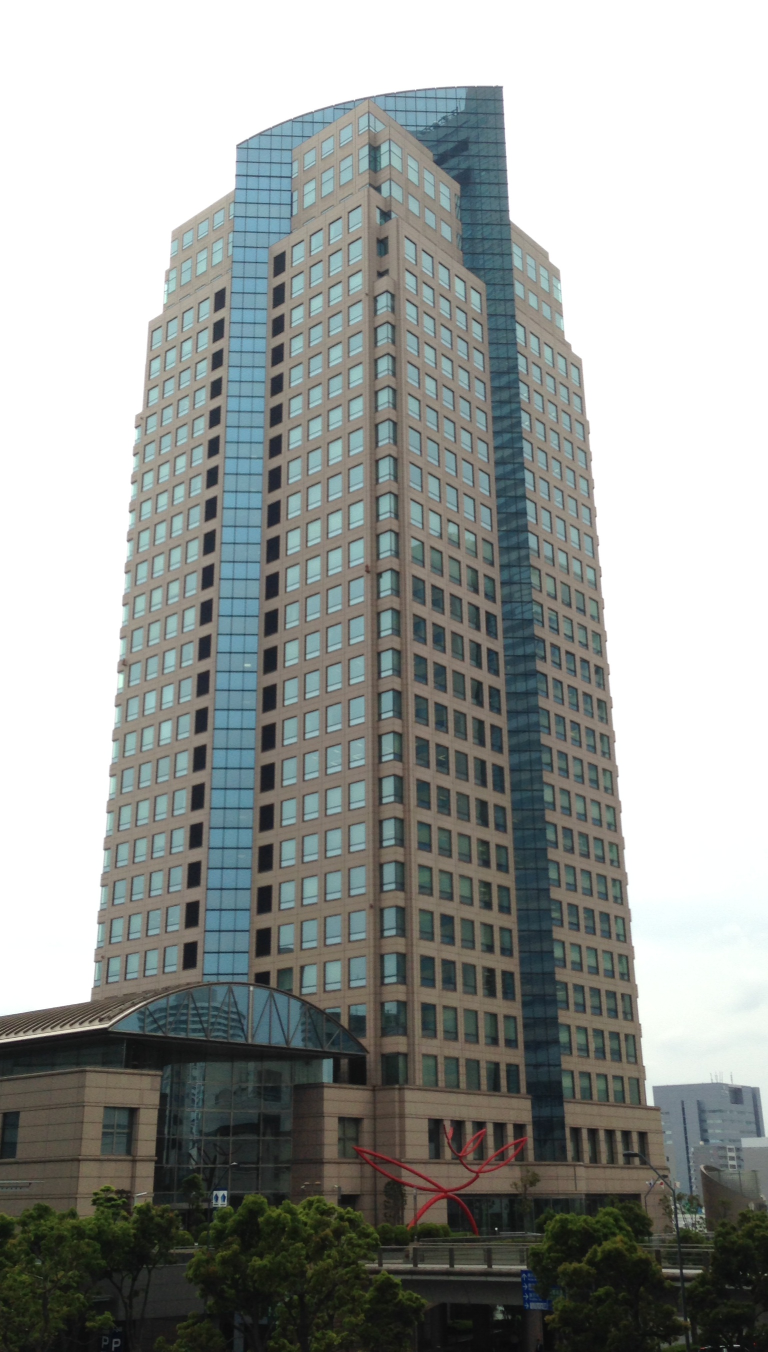 横浜銀行本店ビル（南東側）。